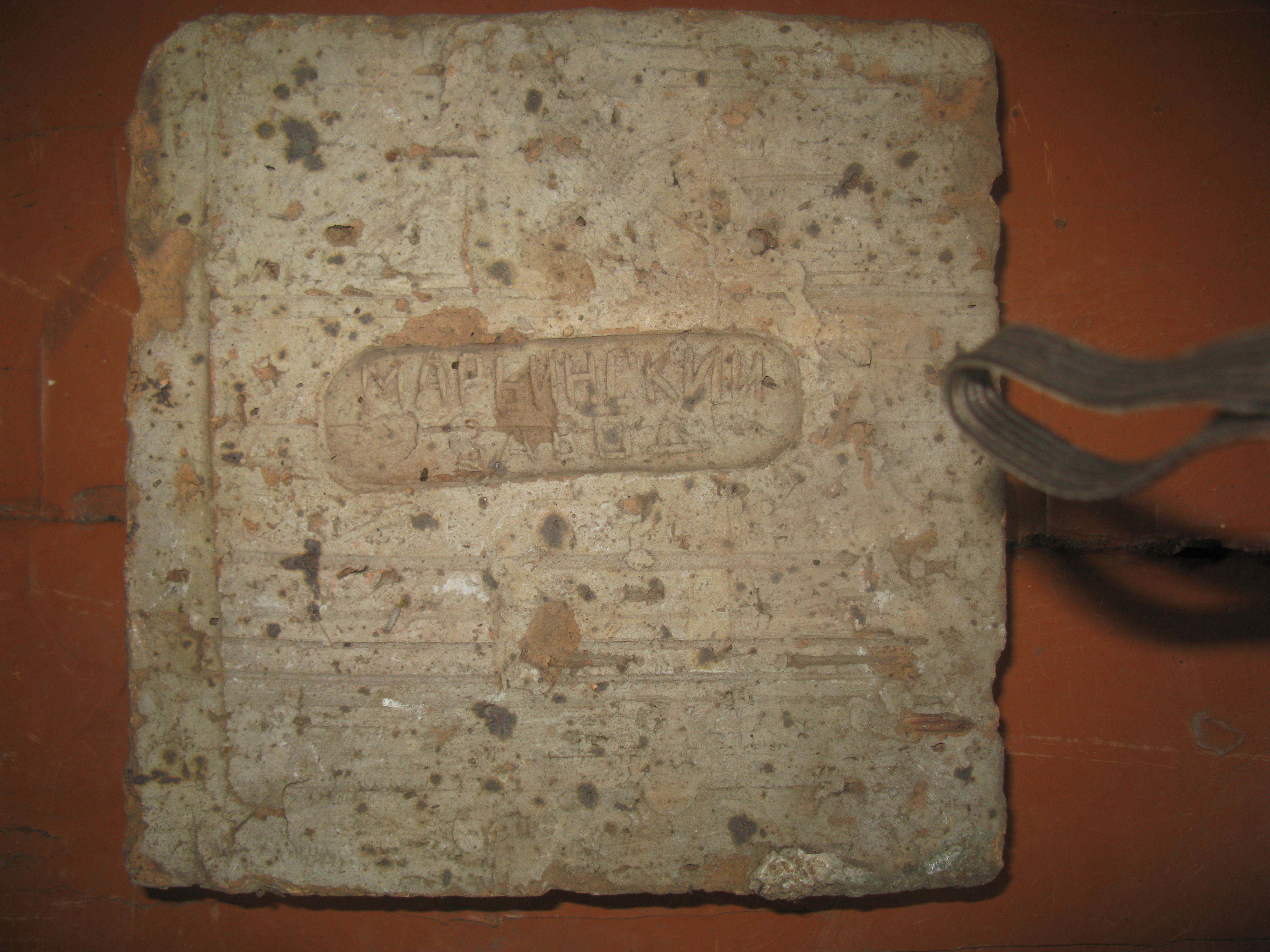 Кирпич Марьинского кирпичного завода